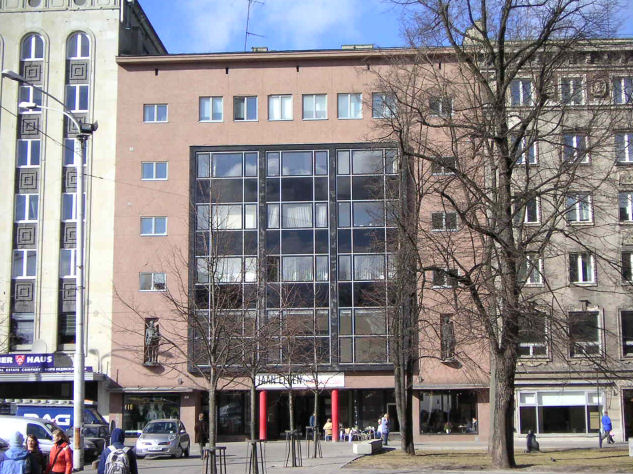 Tallinna Kunstihoone, Vabaduse väljak 7 - Edgar Johan Kuusik (1888 - 1974) (author: Jarmo K)